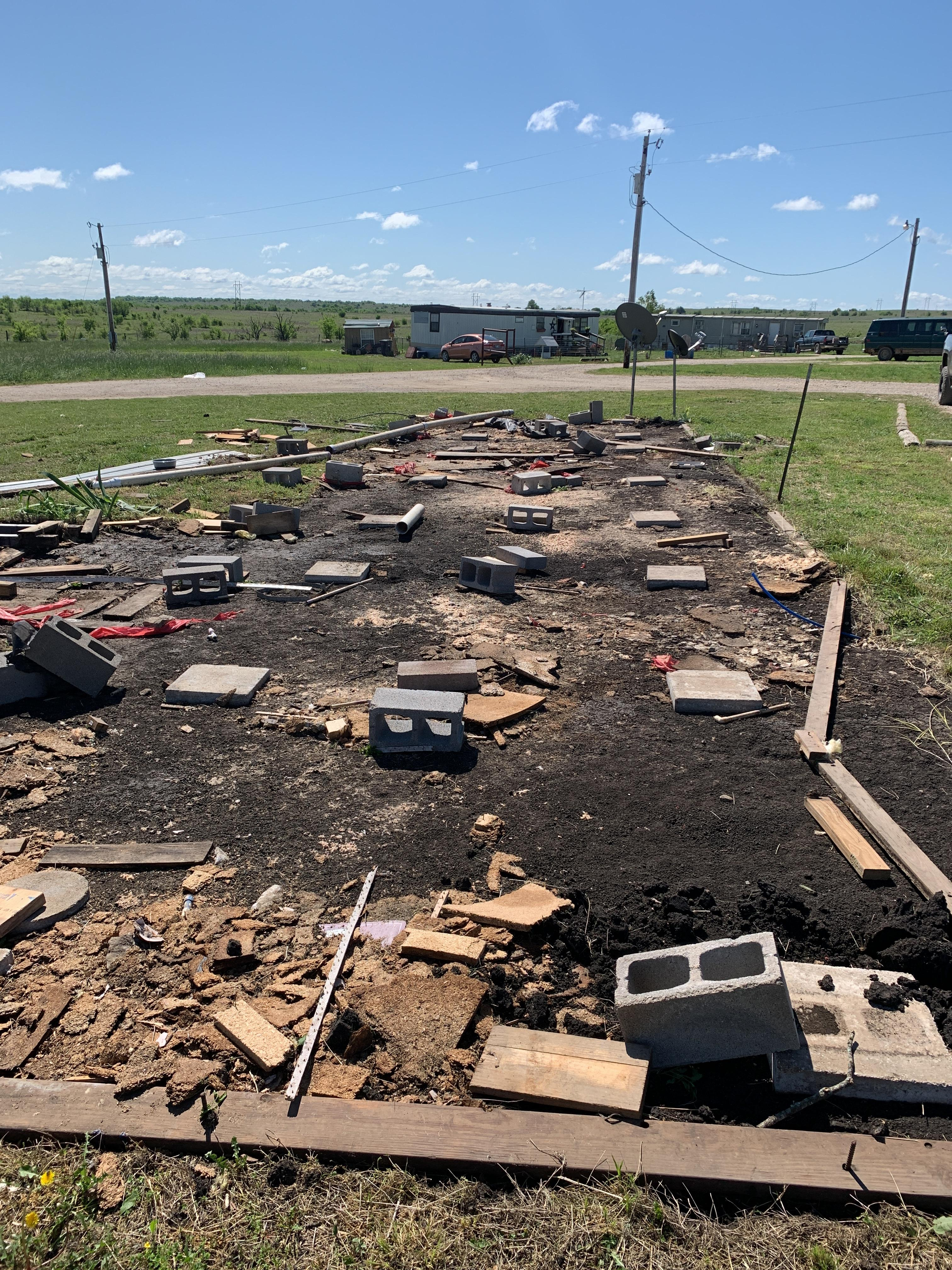 EF2 damage to a mobile home in Madill, OKlahoma.